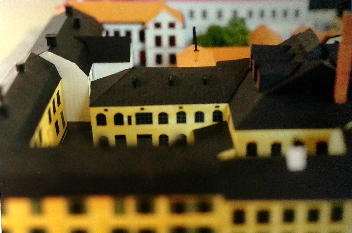 Vy över Bayerska